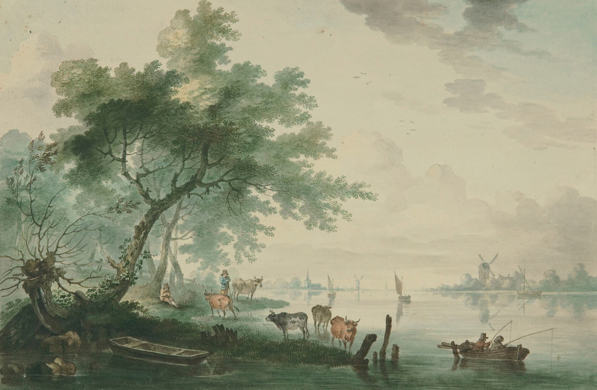 Flusslandschaften mit Vieh und Booten, (2)